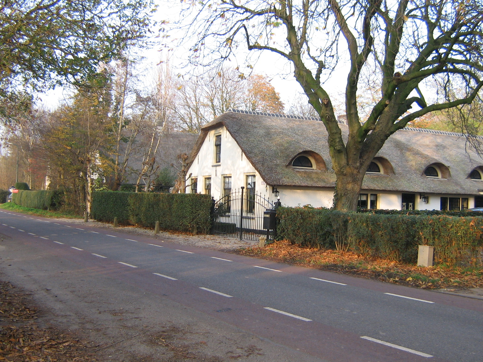 Boerderij in Oud Aa (buurschap bij Nieuwer Ter Aa, gemeente Stichtse Vecht)